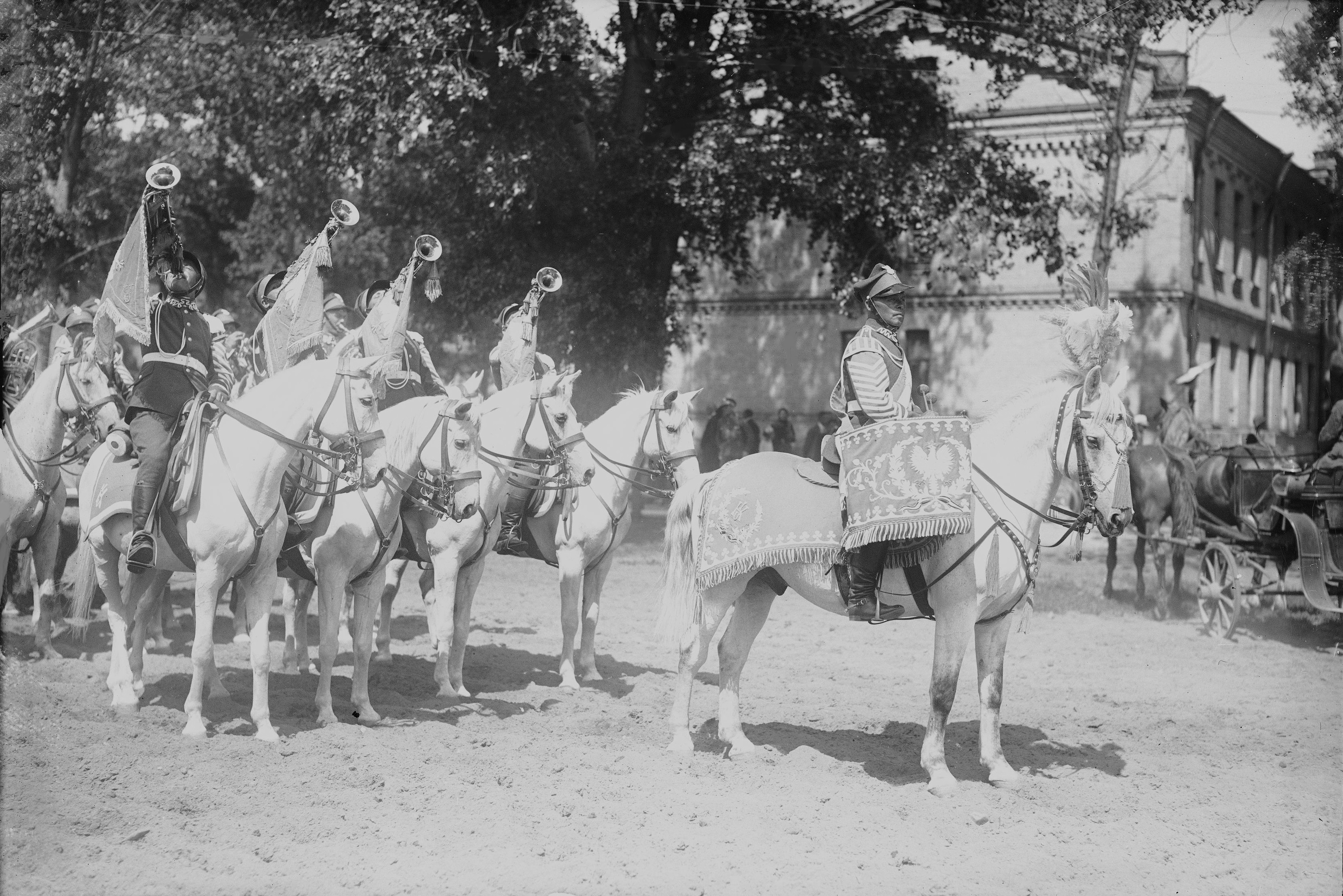 Fanfarzyści i kotlarz.